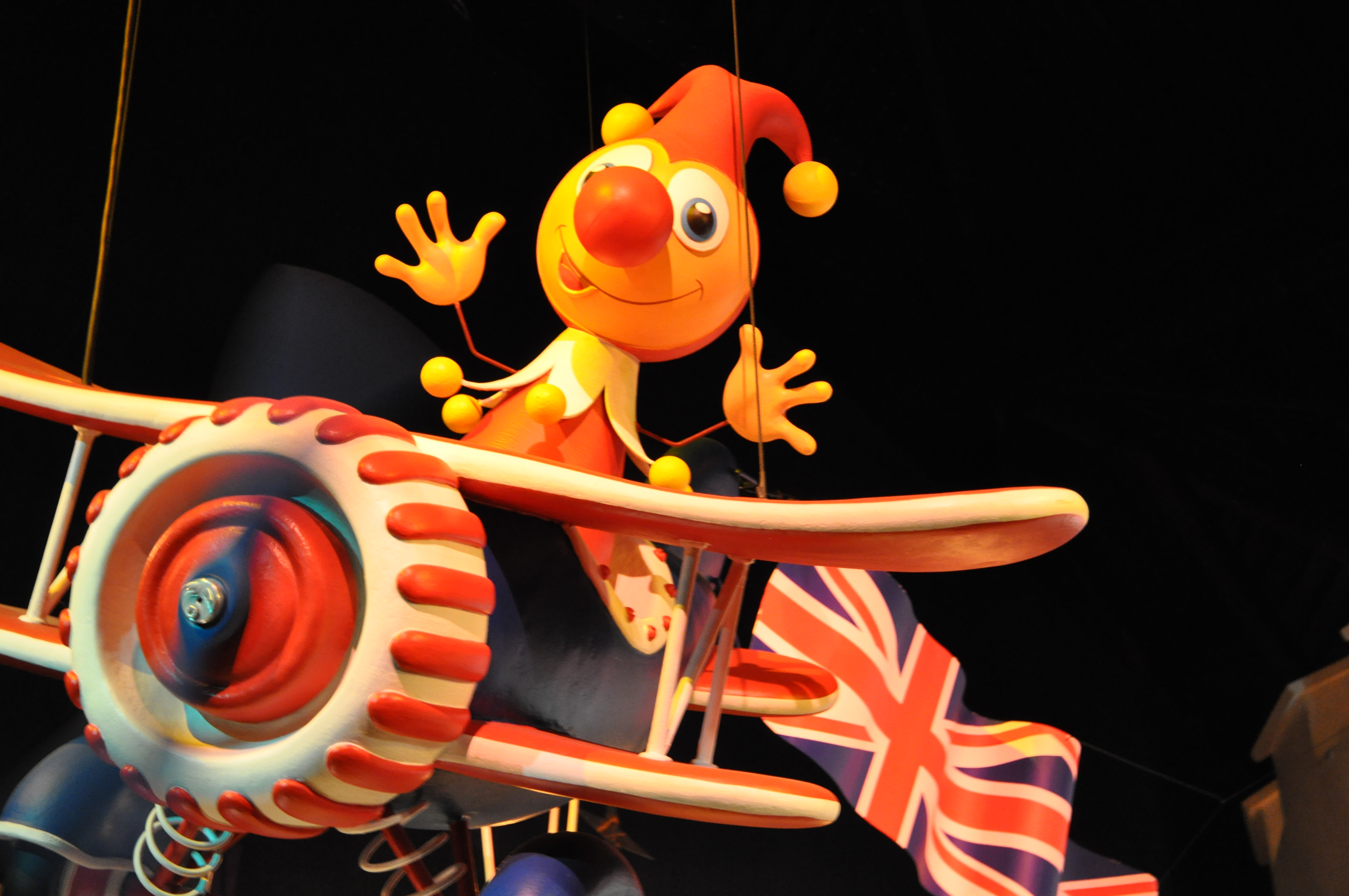 Carnaval Festival in de Efteling te Kaatsheuvel.